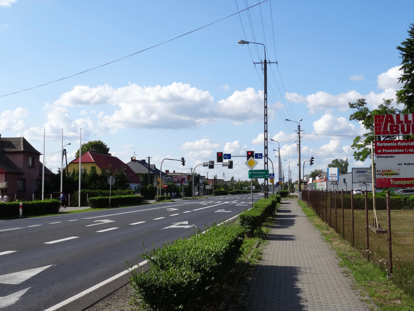 Nowa Wieś Wielka, powiat bydgoski. Droga krajowa nr 25